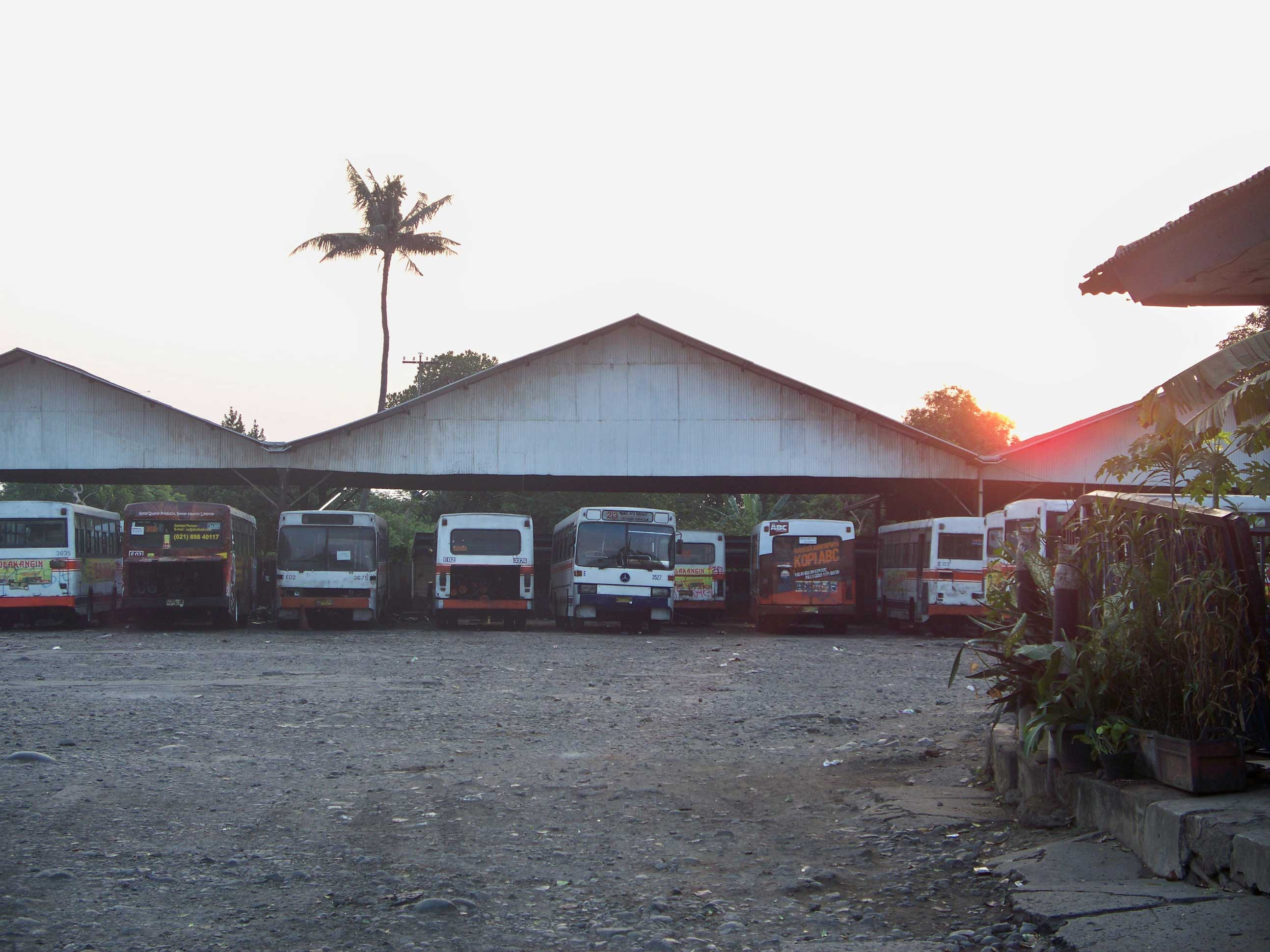 Poll PPD Klender